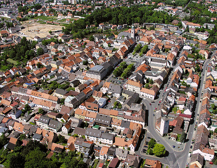 Stadtkern von Süden gesehen